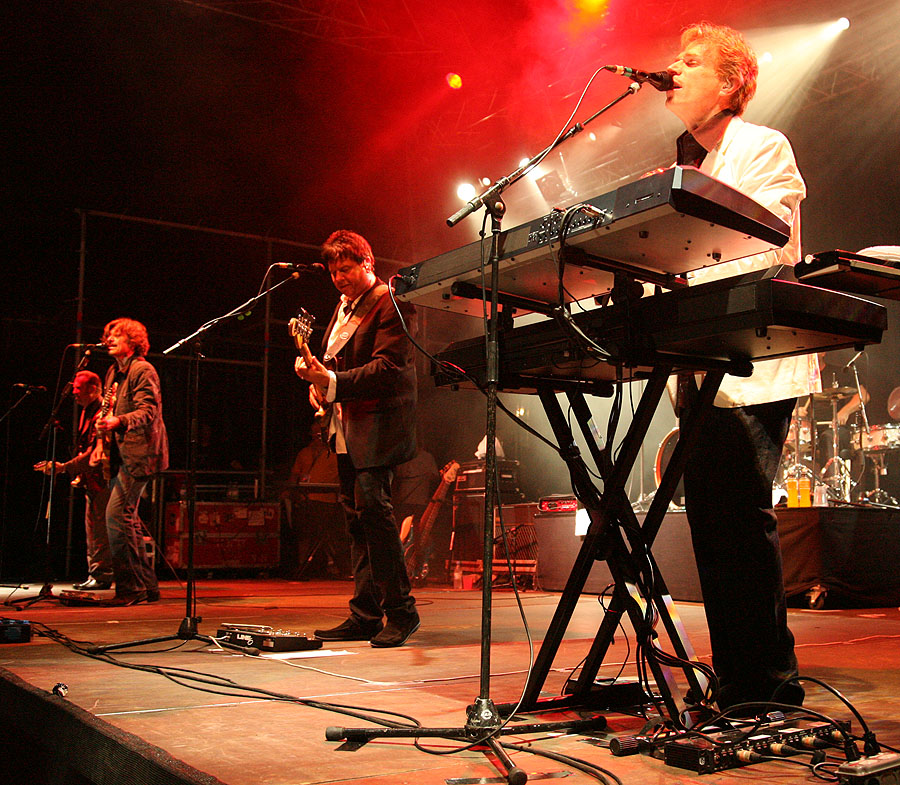 The Hooters bei einem Auftritt in Hamm